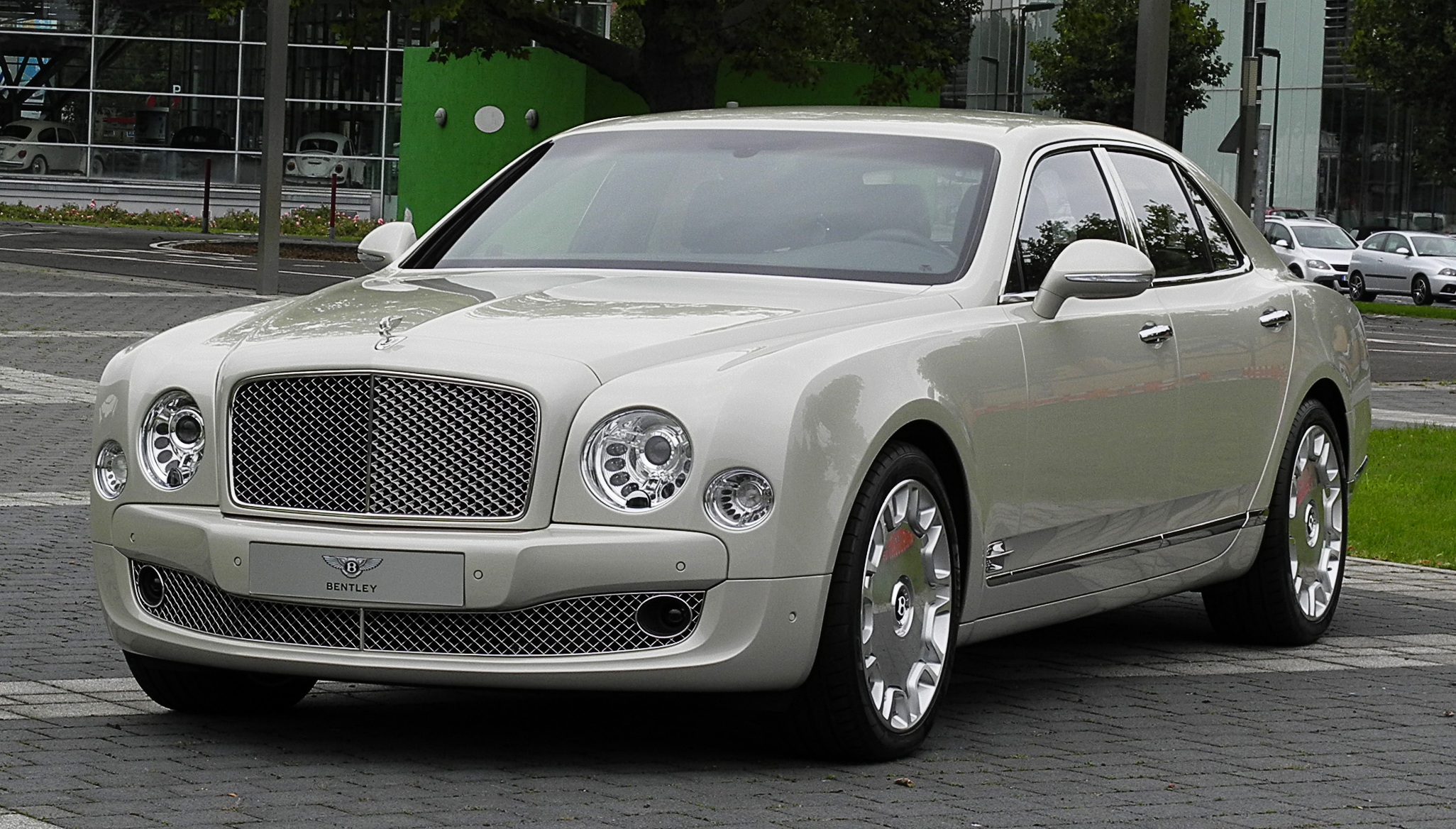 Bentley Mulsanne